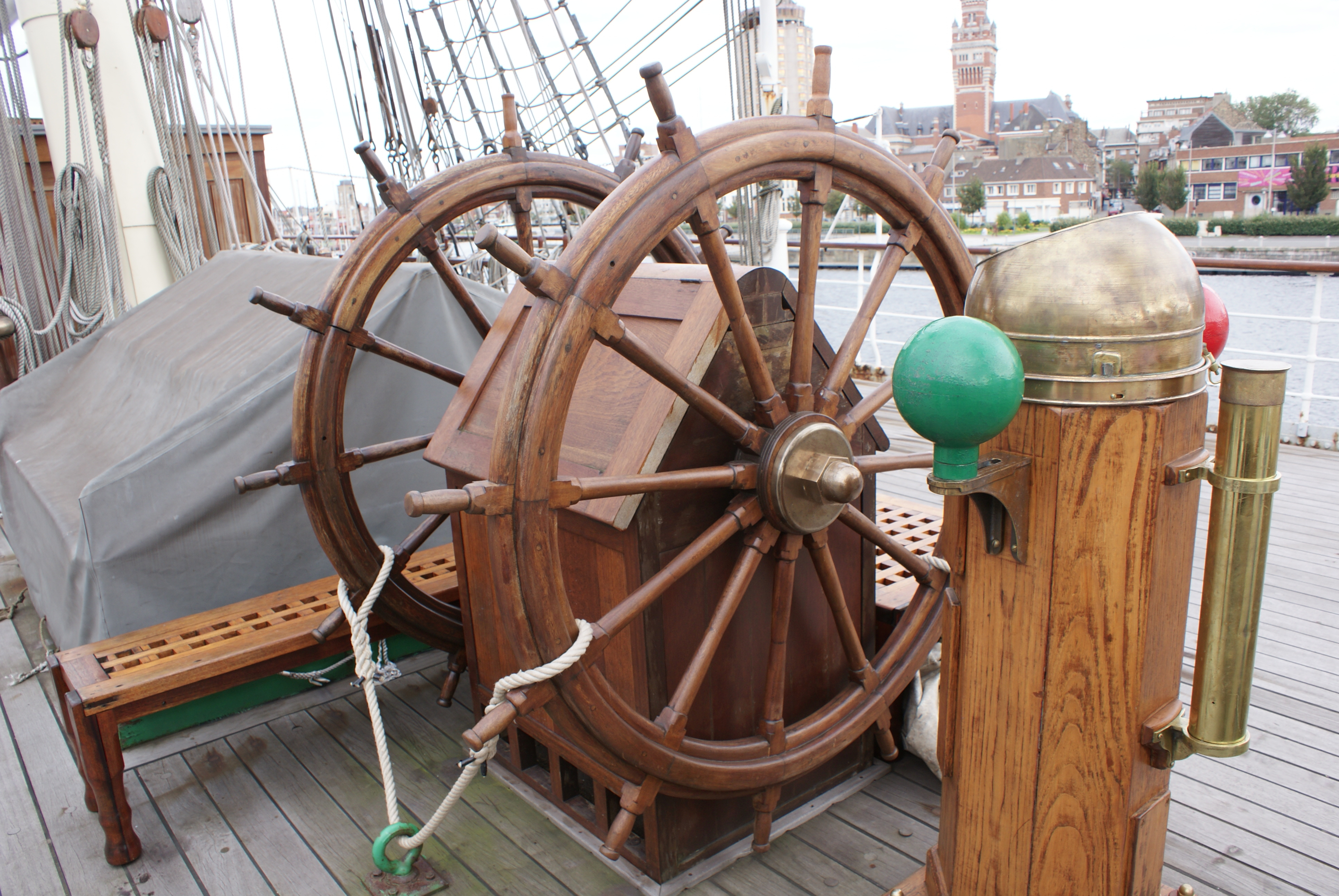 Barres de navigation du trois-mâts carré Duchesse Anne (Musée portuaire de Dunkerque, Nord, France).